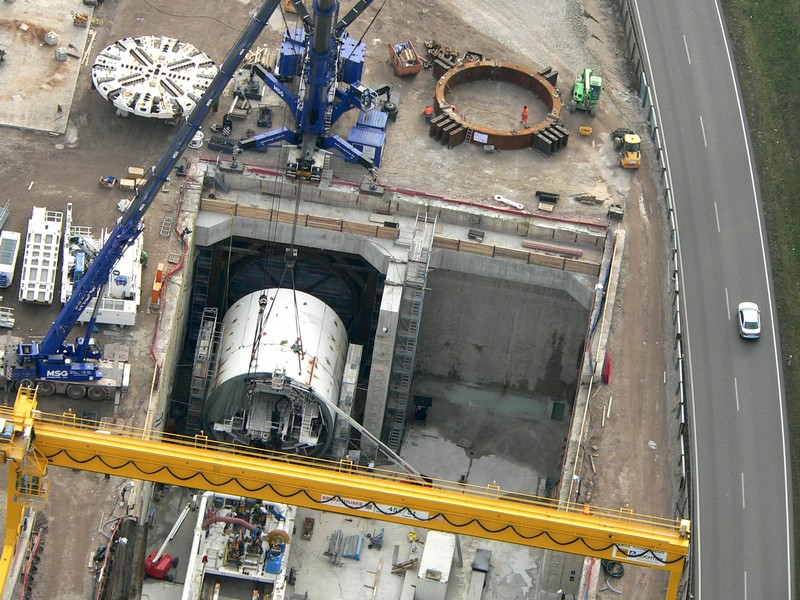 Luftaufnahme: Rastatter Tunnel